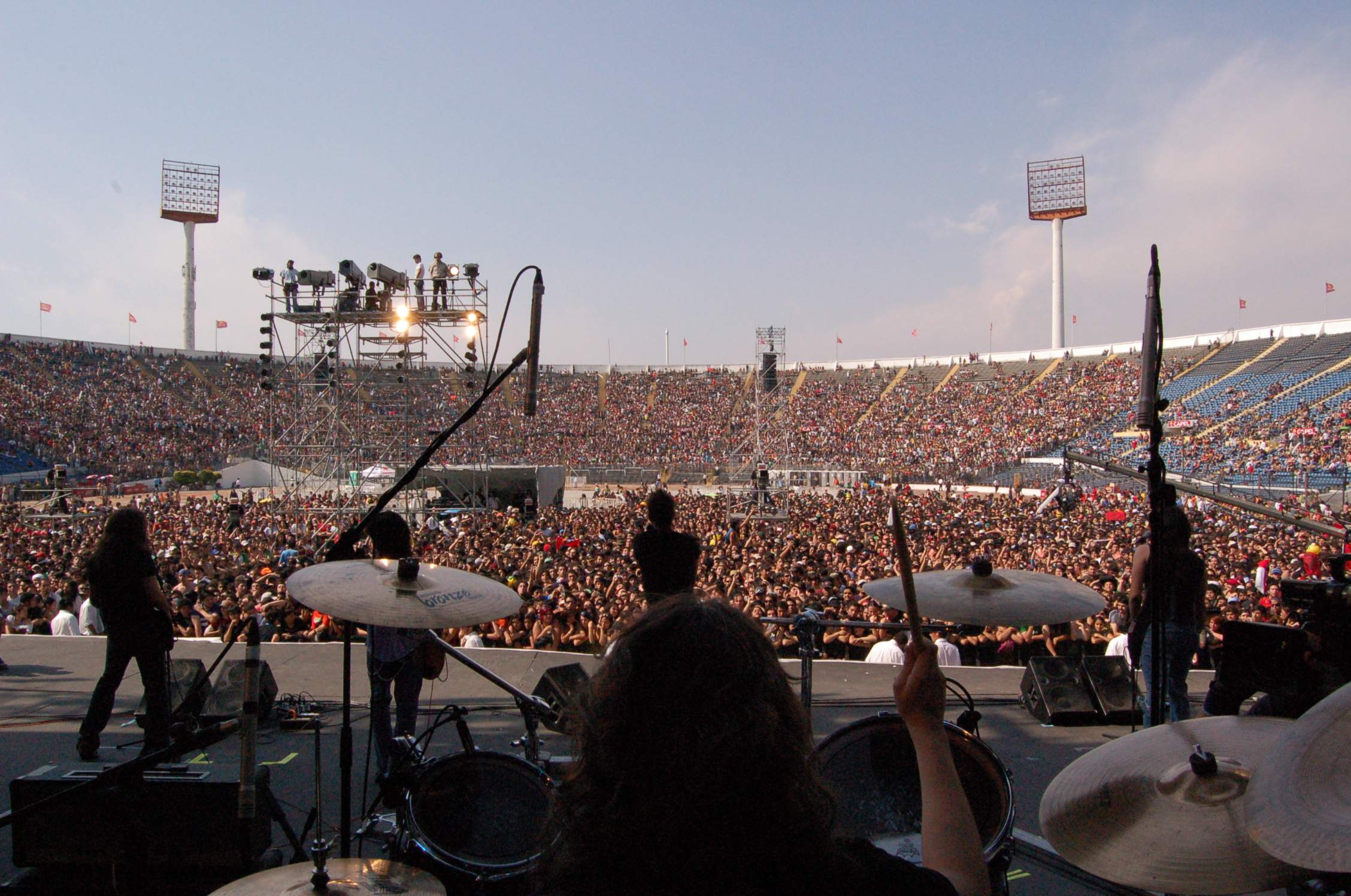 Presentacion de Fahrenheit en La Cumbre del Rock en el Estadio Nacional de Chile en Santiago, Uno de los eventos del Rock Mas grandes del pais.